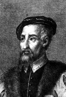 Retrato de Andrés Laguna